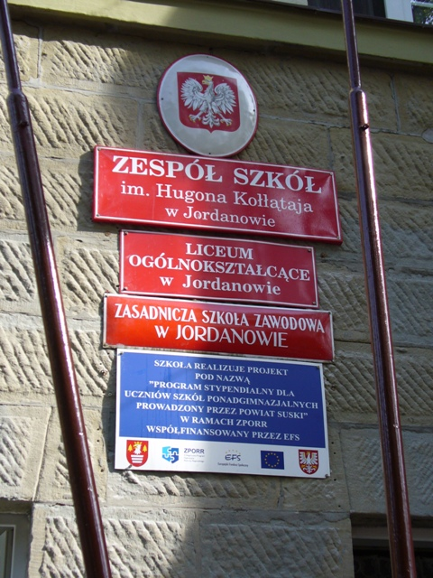 Liceum Ogólnokształcące w Jordanowie-tabliczka informacyjna